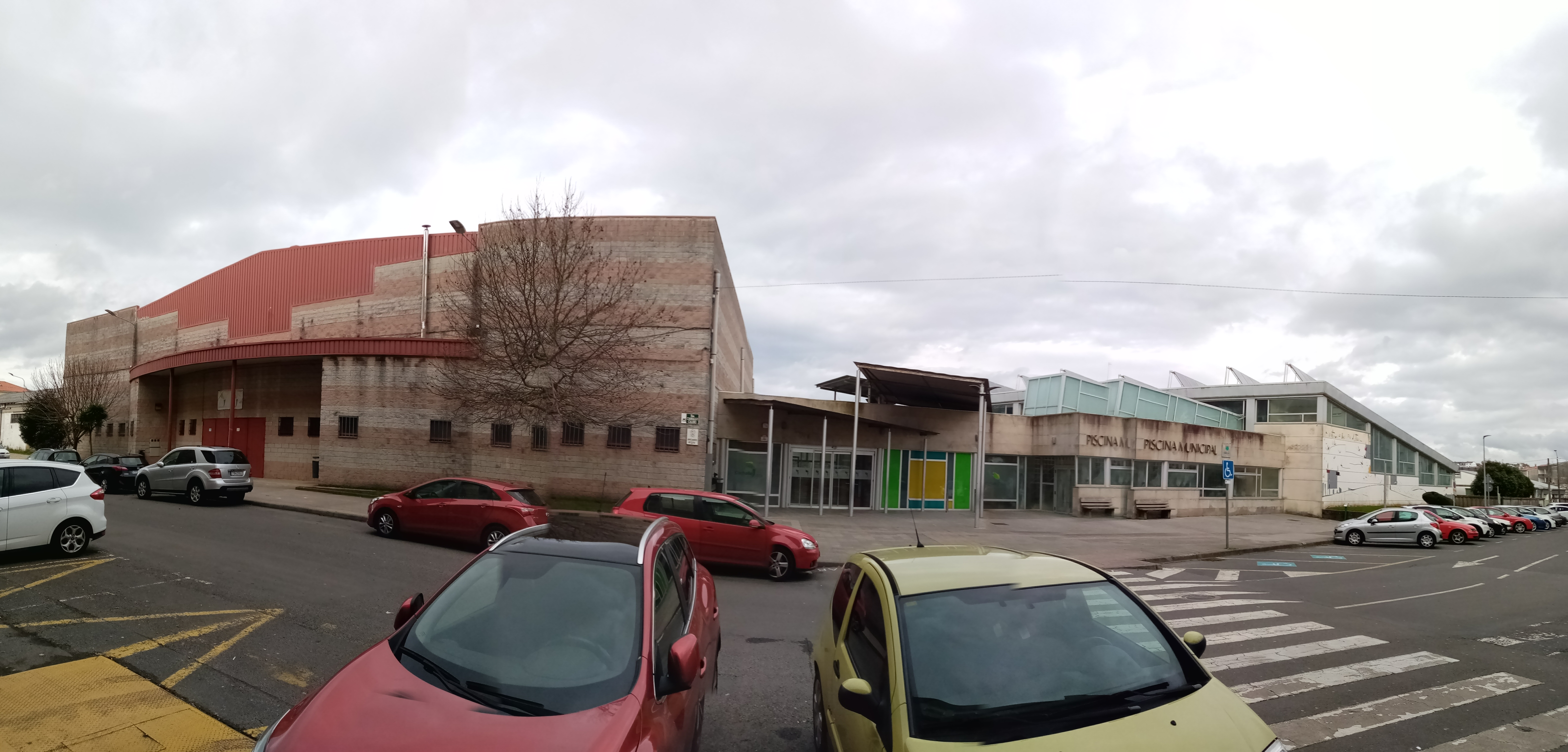 Panorámica do Complexo Deportivo Carballo Calero en Carballo.